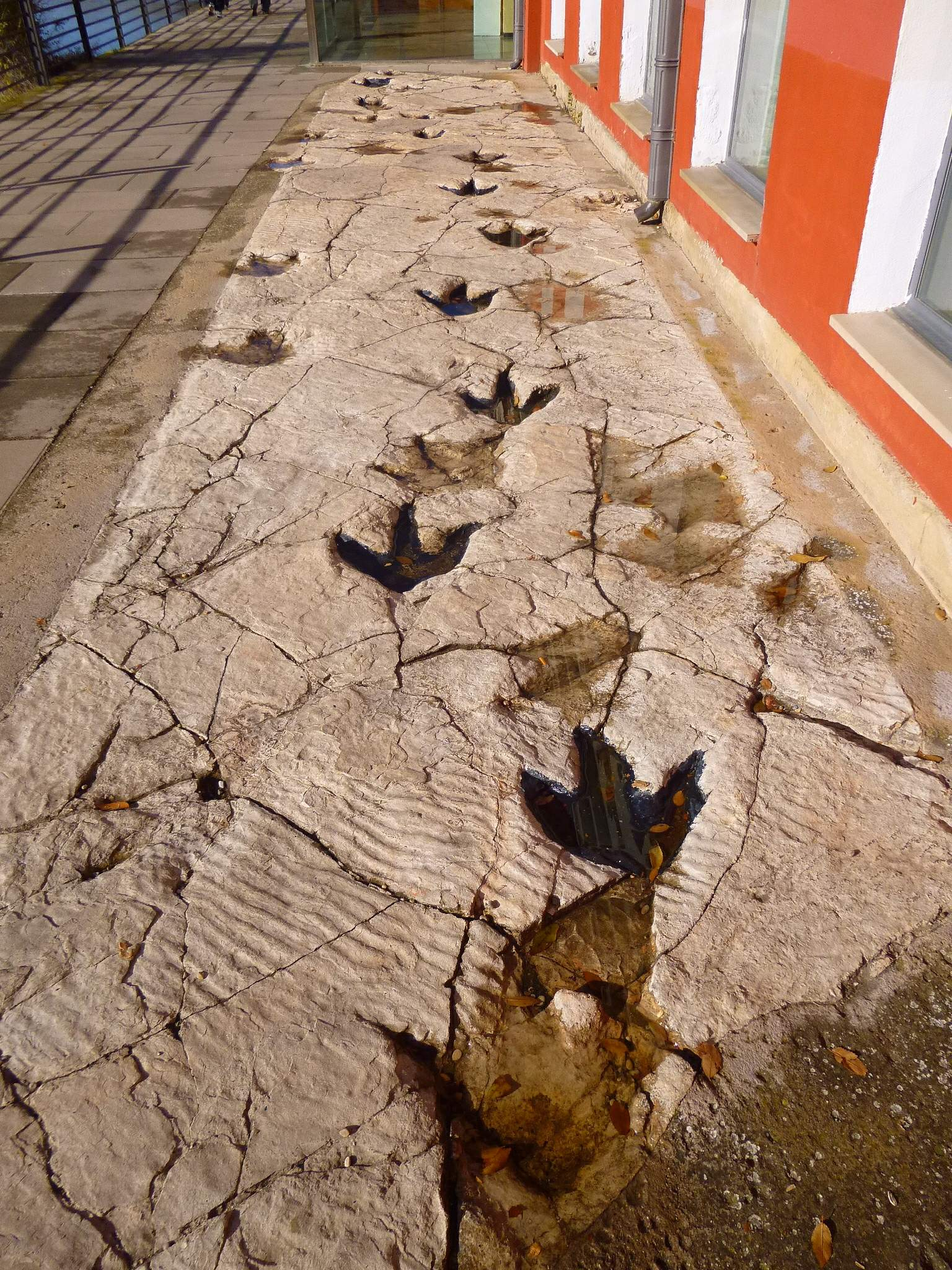 Logroño - Casa de las Ciencias, rastro de terópodo, yacimiento de Los Cayos A, en Cornago, La Rioja